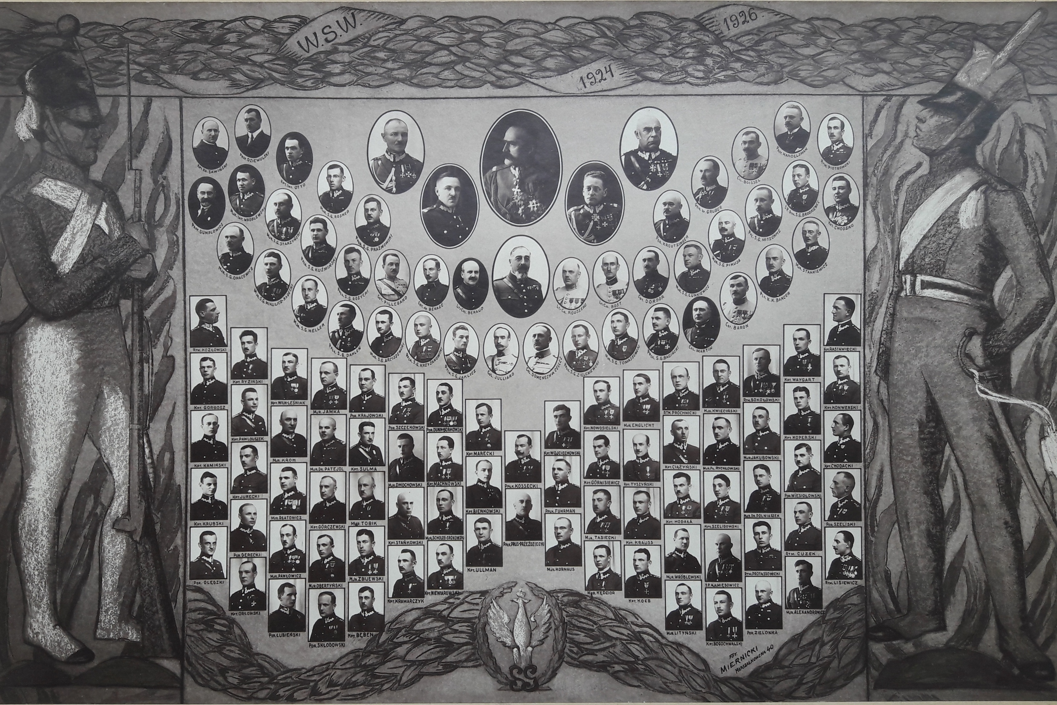 Kadra i absolwenci Wyższej Szkoły Wojennej w Warszawie – Kurs Normalny 1924-1926 (V promocja)